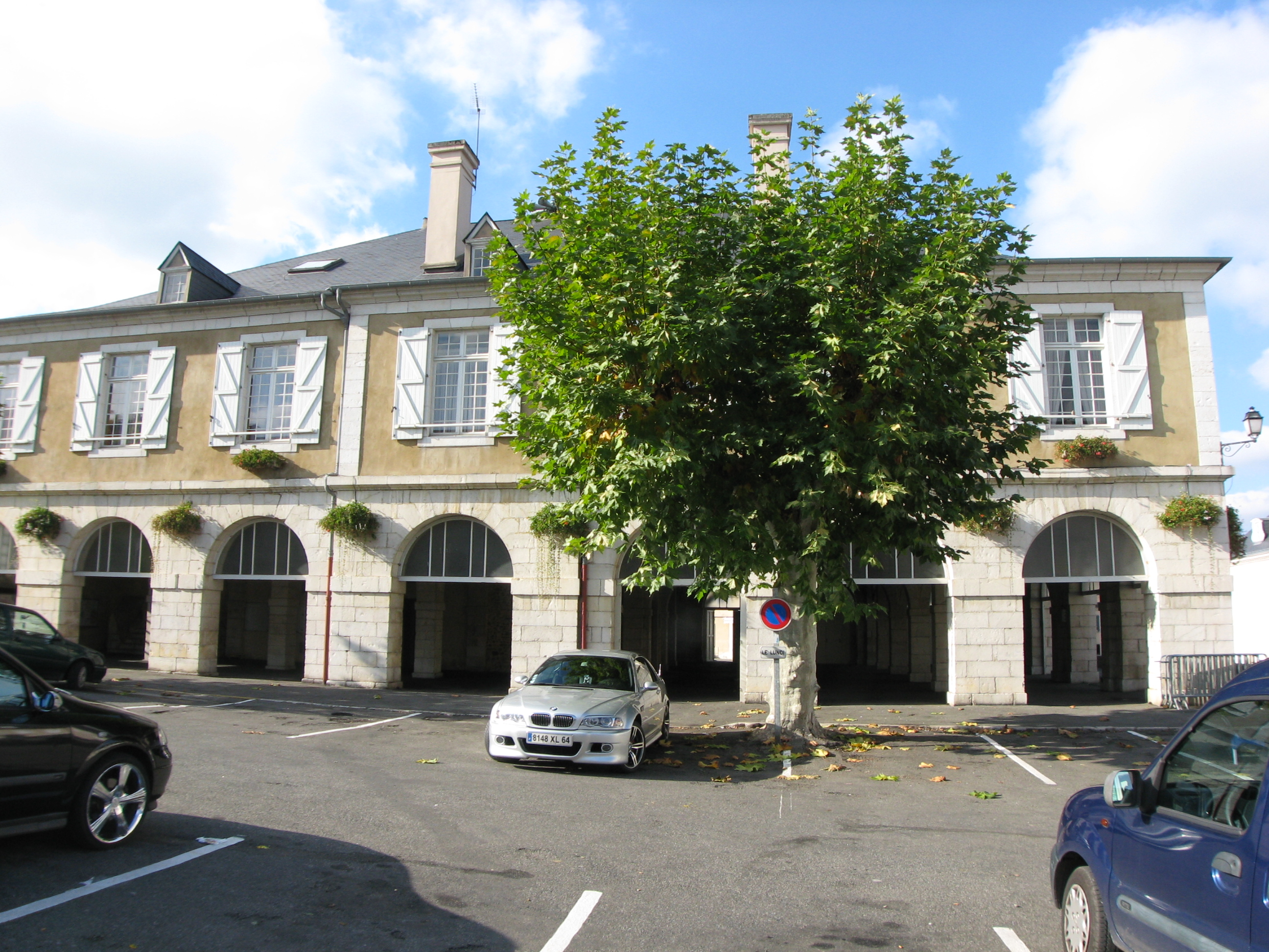 Vue des halles de Monein (Pyrénées Atlantiques) Pyrénées).